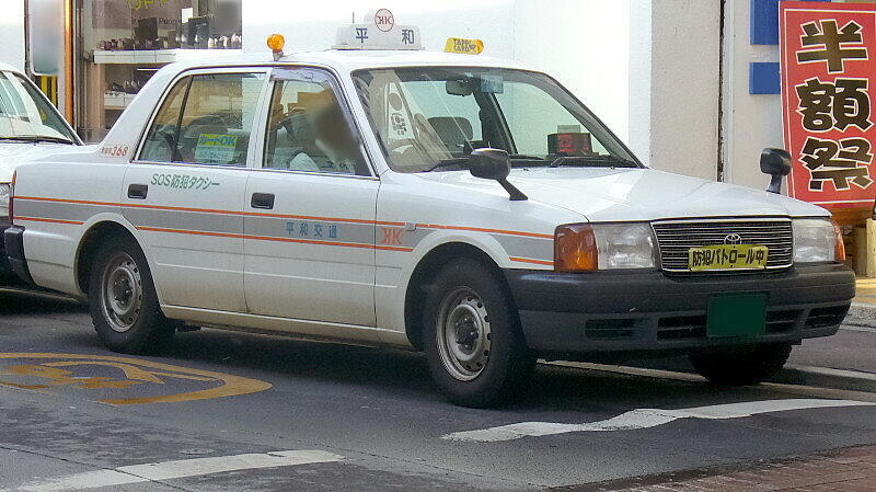 平和交通（宮城県仙台市）のトヨタ・コンフォート（スタンダード・タクシー仕様）。